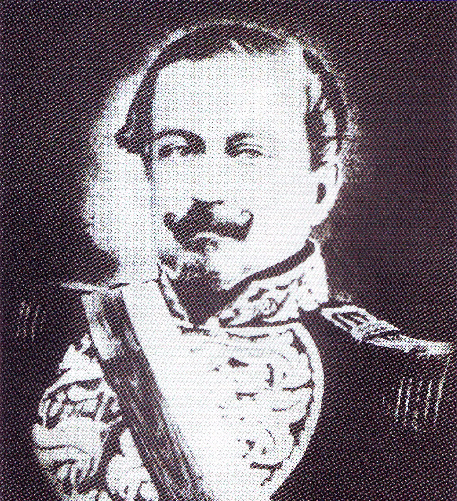 manuel ignacio de vivanco fue elegido presidente